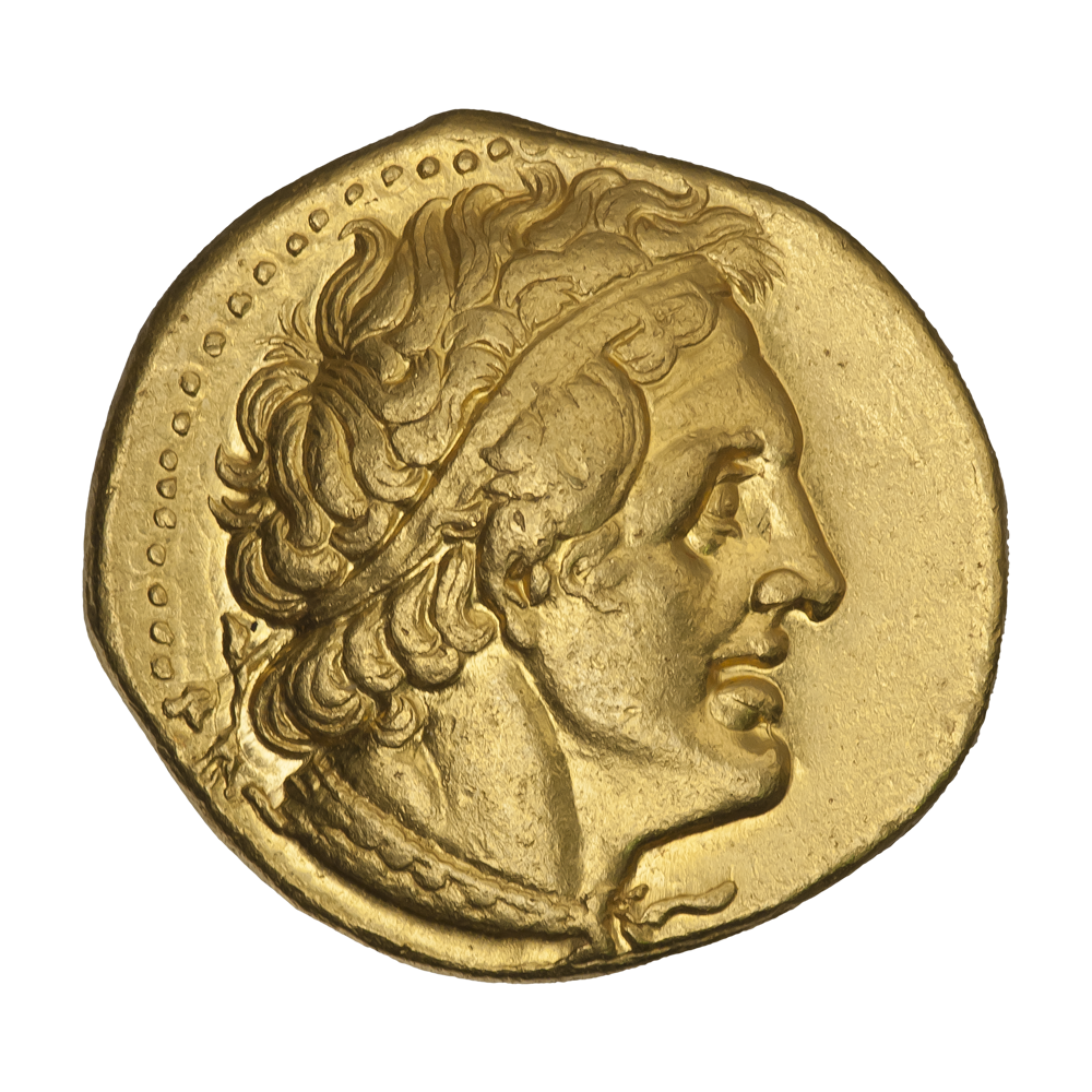 Египетское царство. Александрия. Птолемей II Филадельф (285—246 гг. до н.э.). Пентадрахма. Ок. 280—270 гг. до н.э. Аверс. Голова Птолемея I в диадеме, вправо. Точечный ободок.